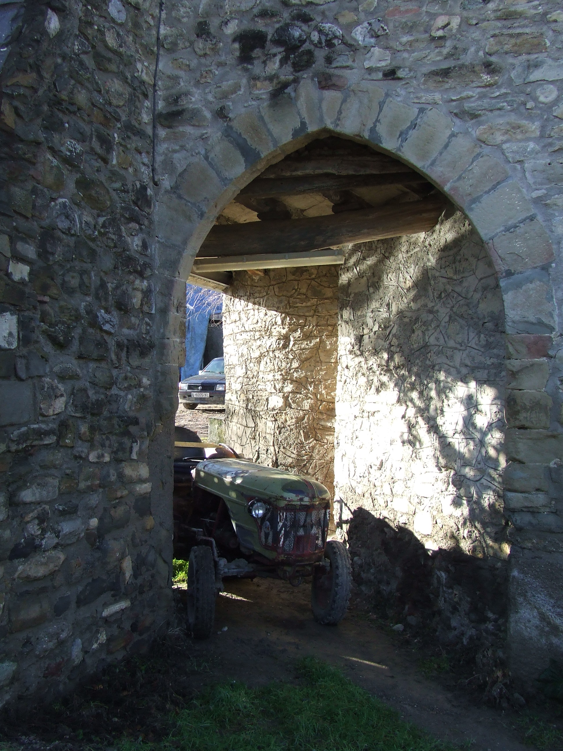 Portal del castell i del poble d'Eroles (Fígols de Tremp, Tremp, Pallars Jussà)